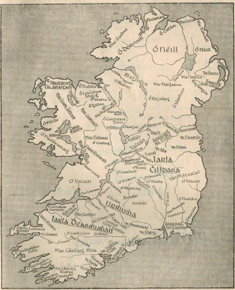 leathanach scanta ón téacsleabhar